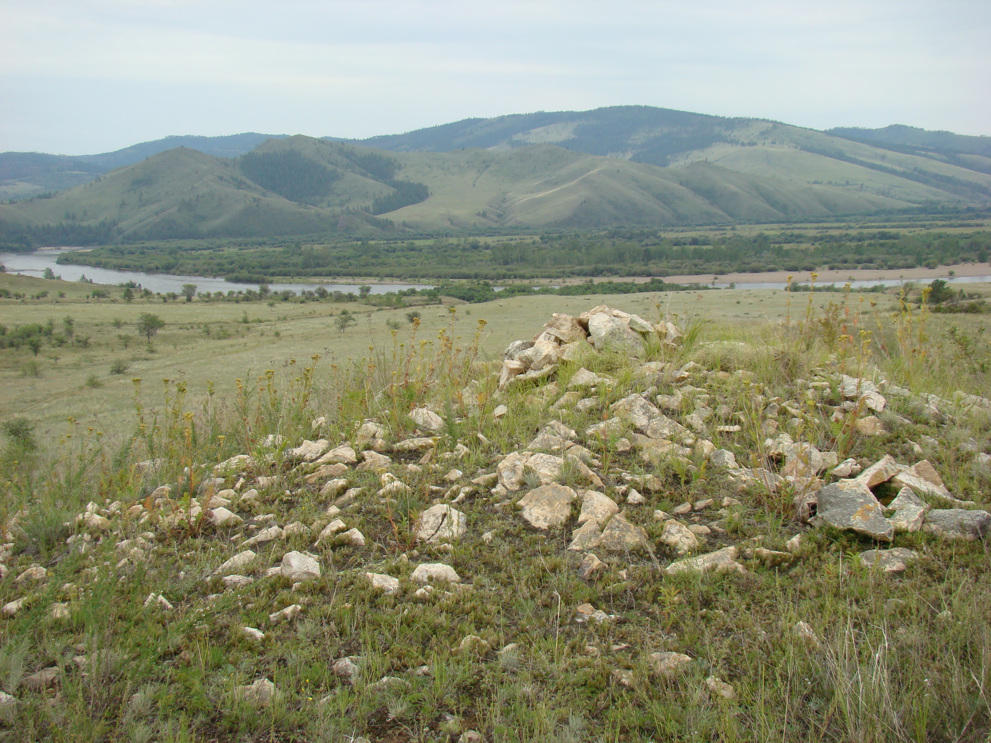 Дырестуй (Джидинский район)